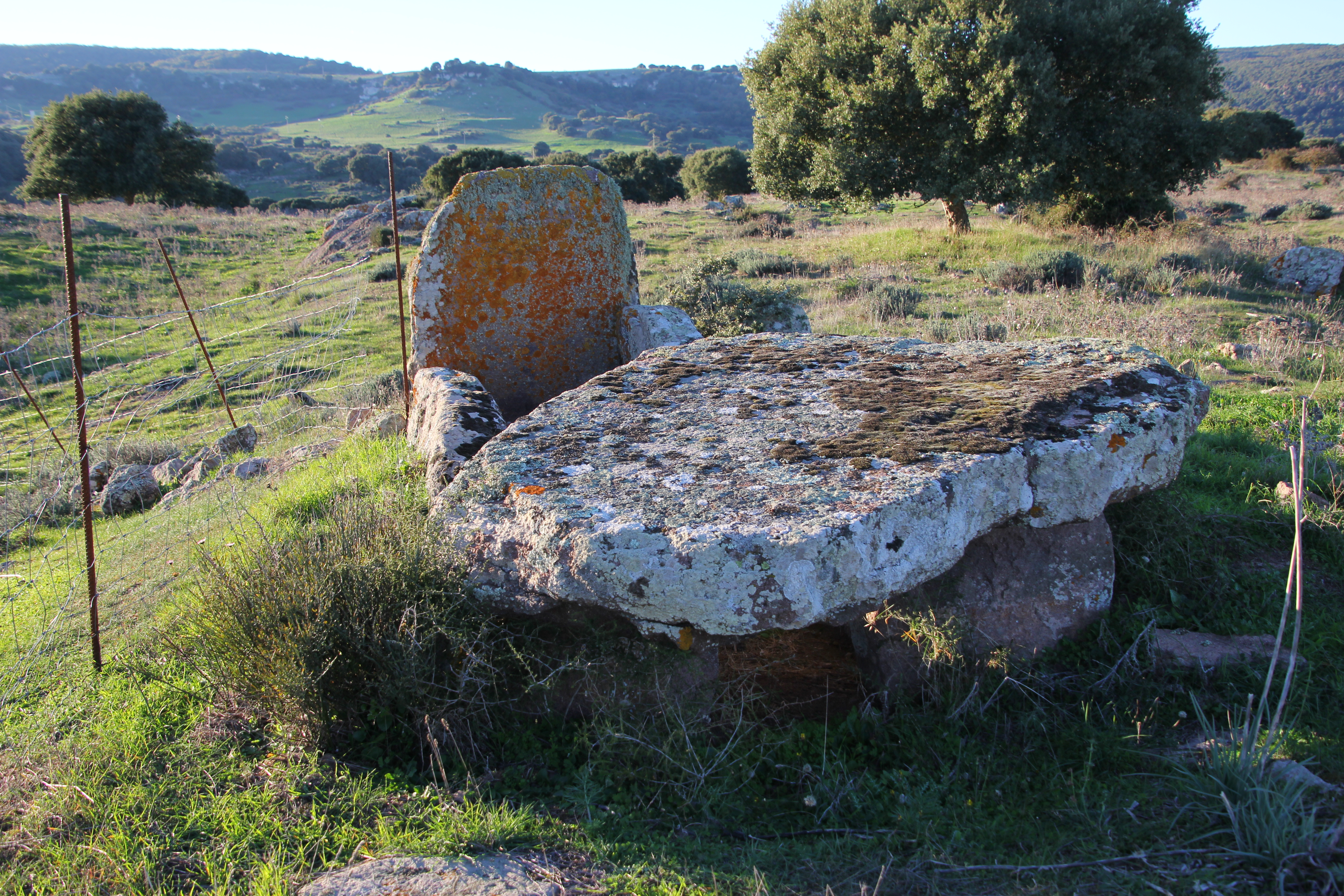 Cossoine - Tomba dei giganti di Paddeu o Su Truppu